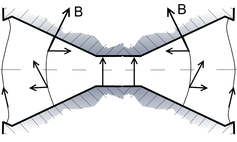 Betatron magnet